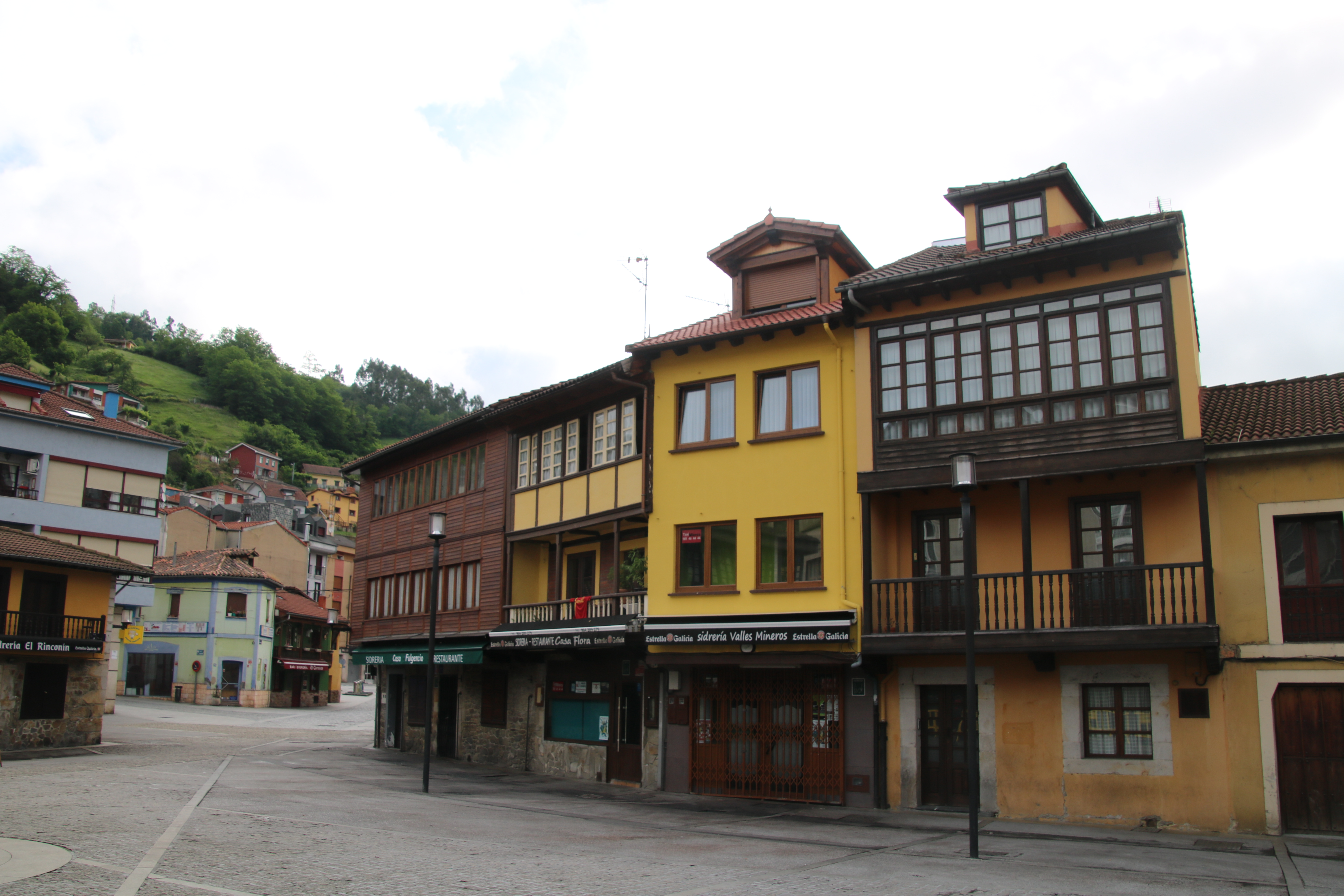 Camino de San Salvador_tappa da La Pola de Lena a Oviedo